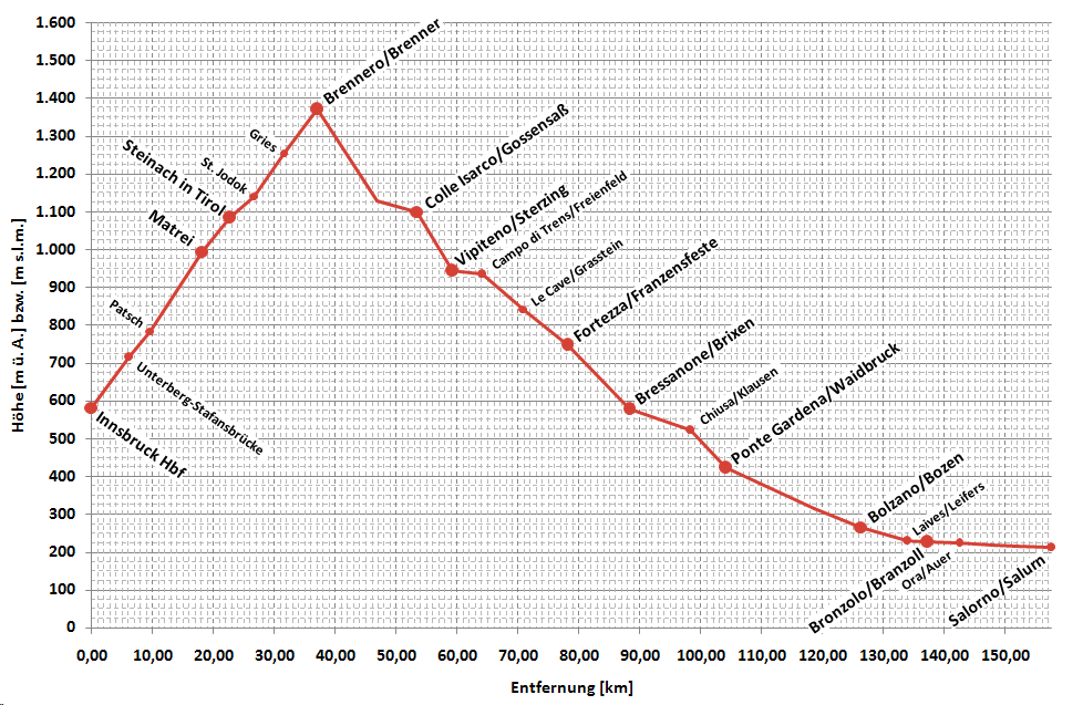 vereinfachtes Höhenprofil des Abschnittes Innsbruck-Salorno/Salurn der Brennerbahn